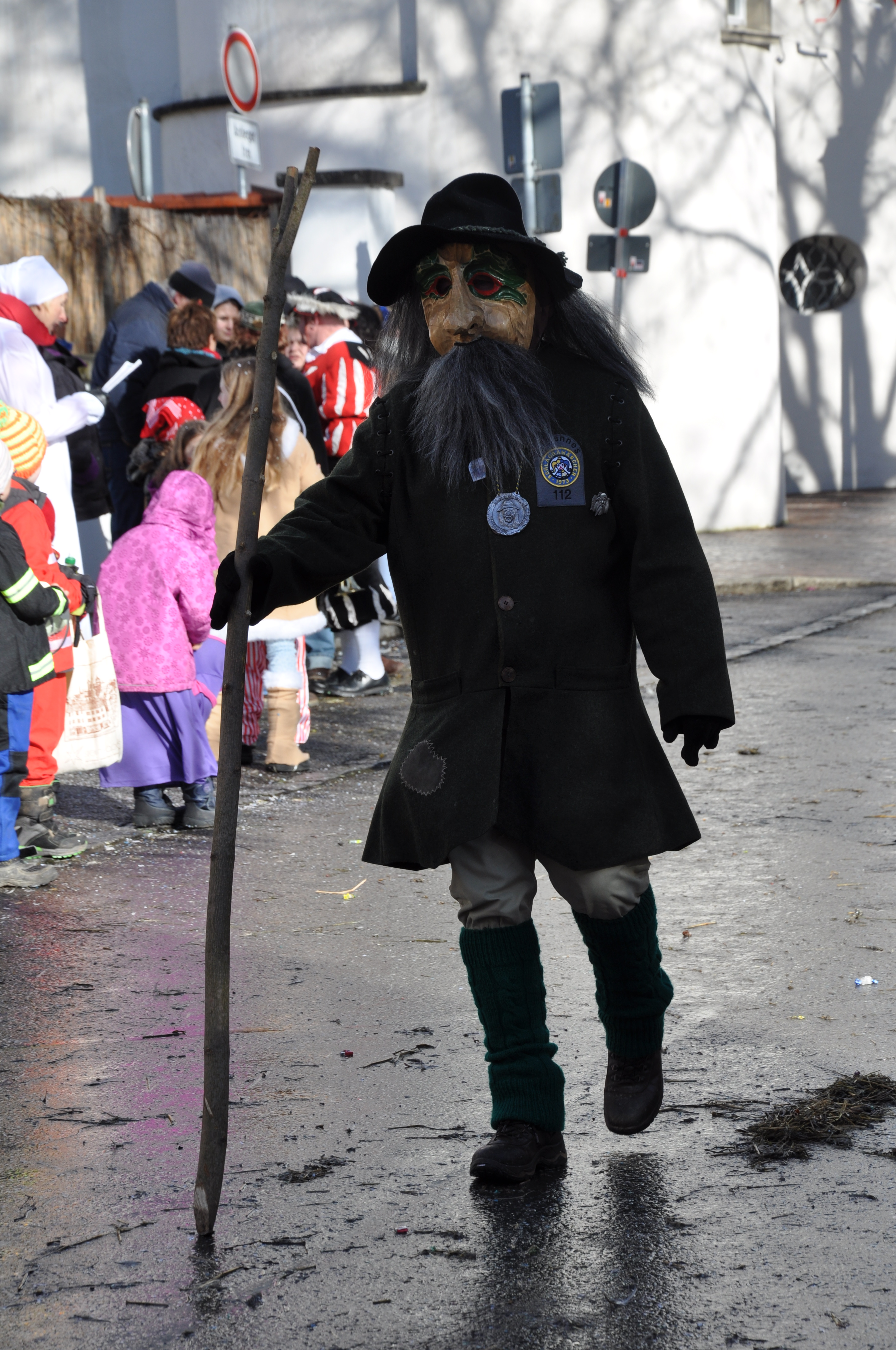 Narrenzunft Schlaggawäscher e. V. Oberkochen; Narrenfigur: Bilzhannes Fotografiert beim Ringtreffen des Alemannischen Narrenrings (ANR) 2014 in Weingarten; Narrensprung am 9. Februar 2014